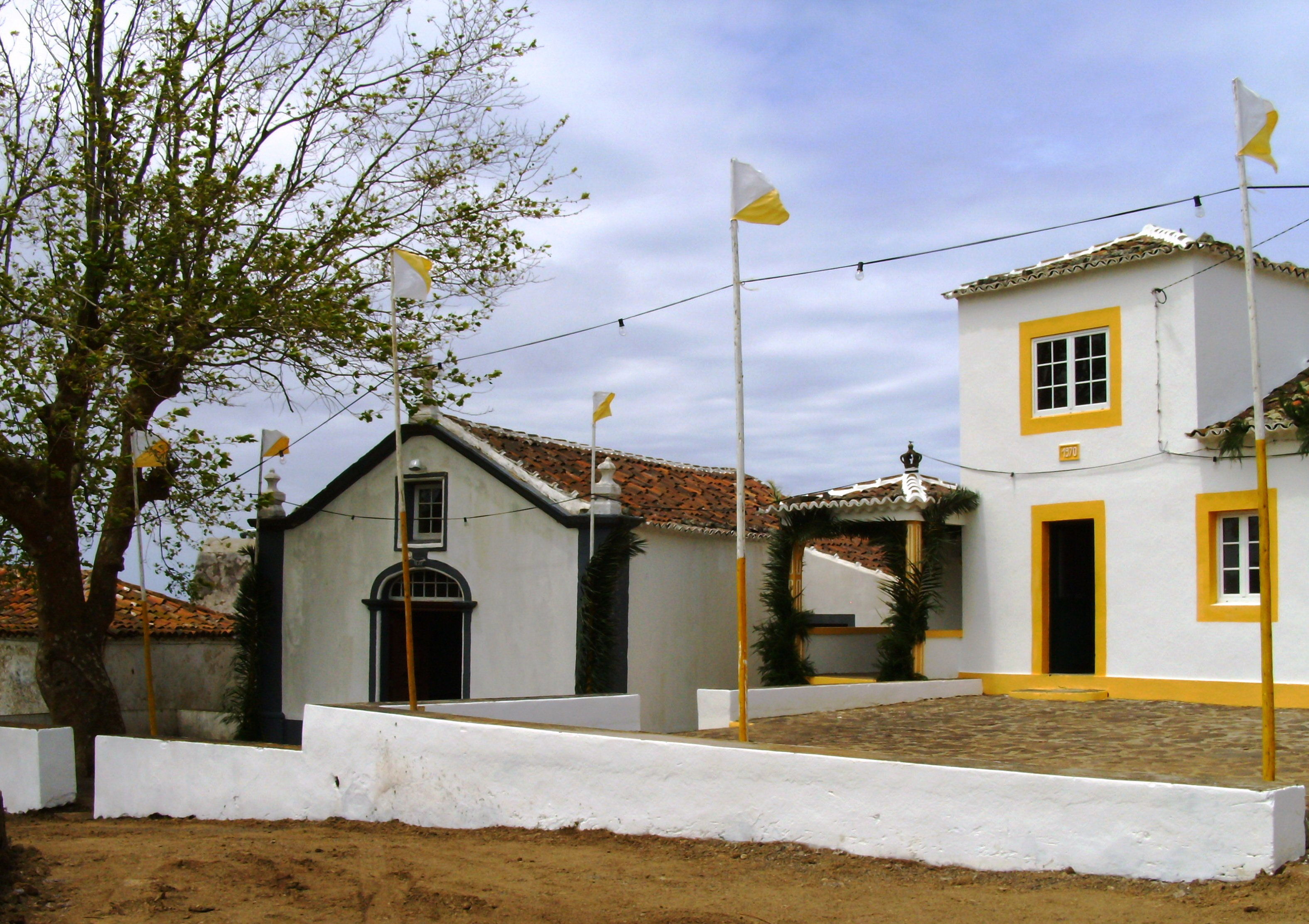 Ermida de Nossa Senhora do Pilar, Ilha de Santa Maria (Açores), Portugal